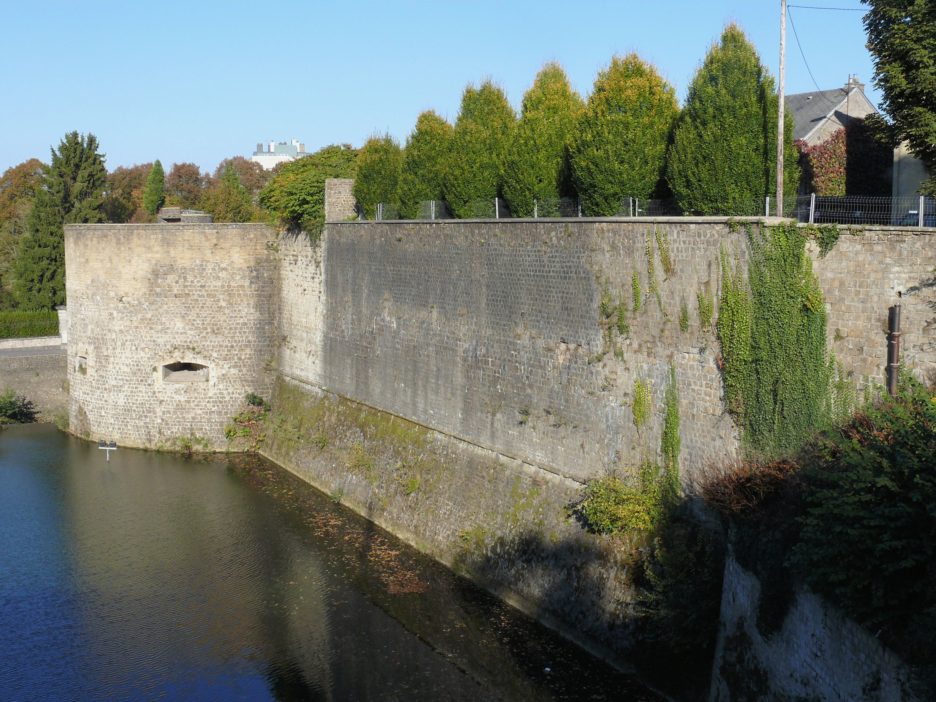 Fortifications de Mézières - Front Ouest - Tour Milard. XVIe siècle